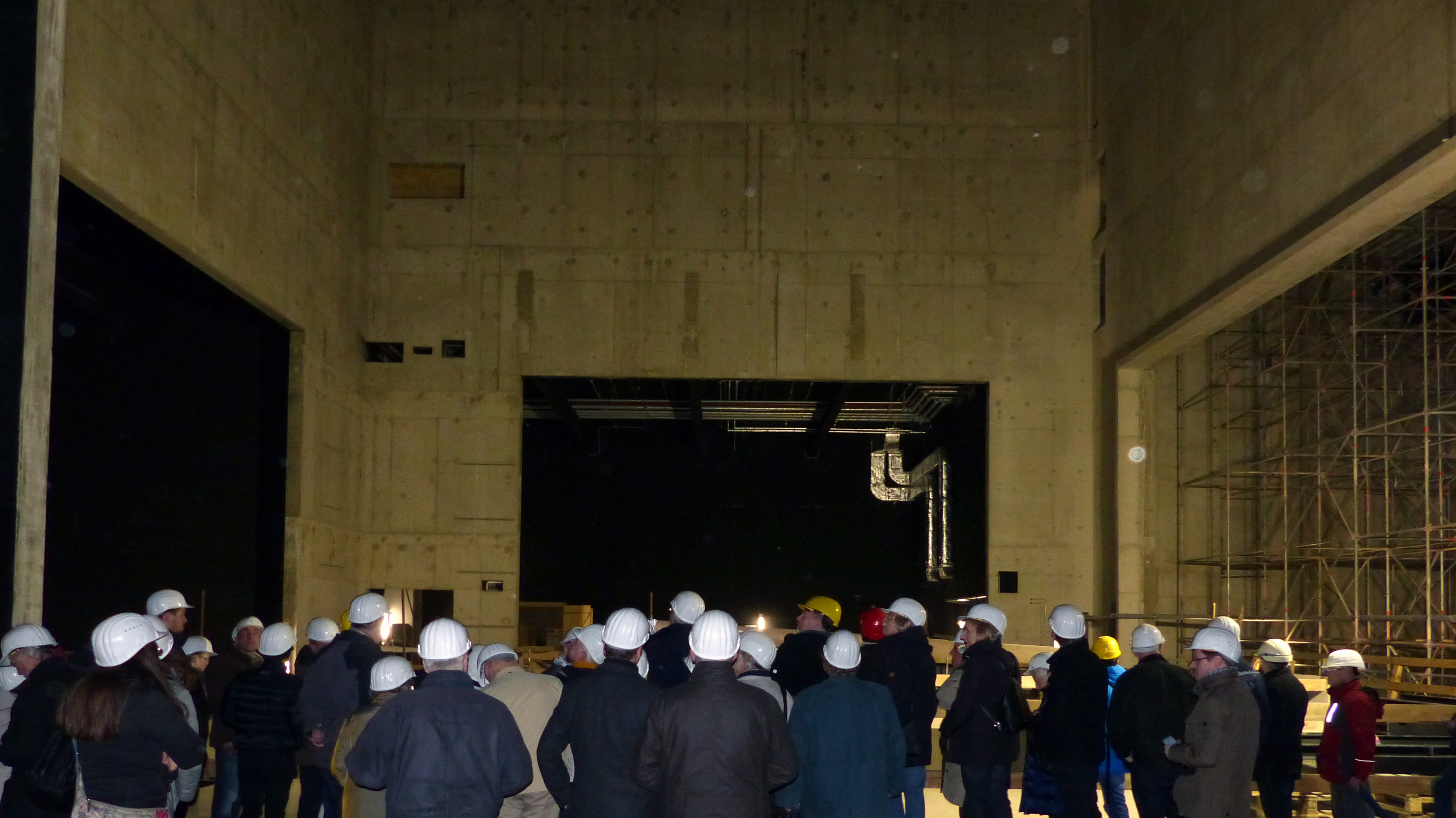 Bühnenbereich im Neubau der Staatsoperette Dresden, Dezember 2015